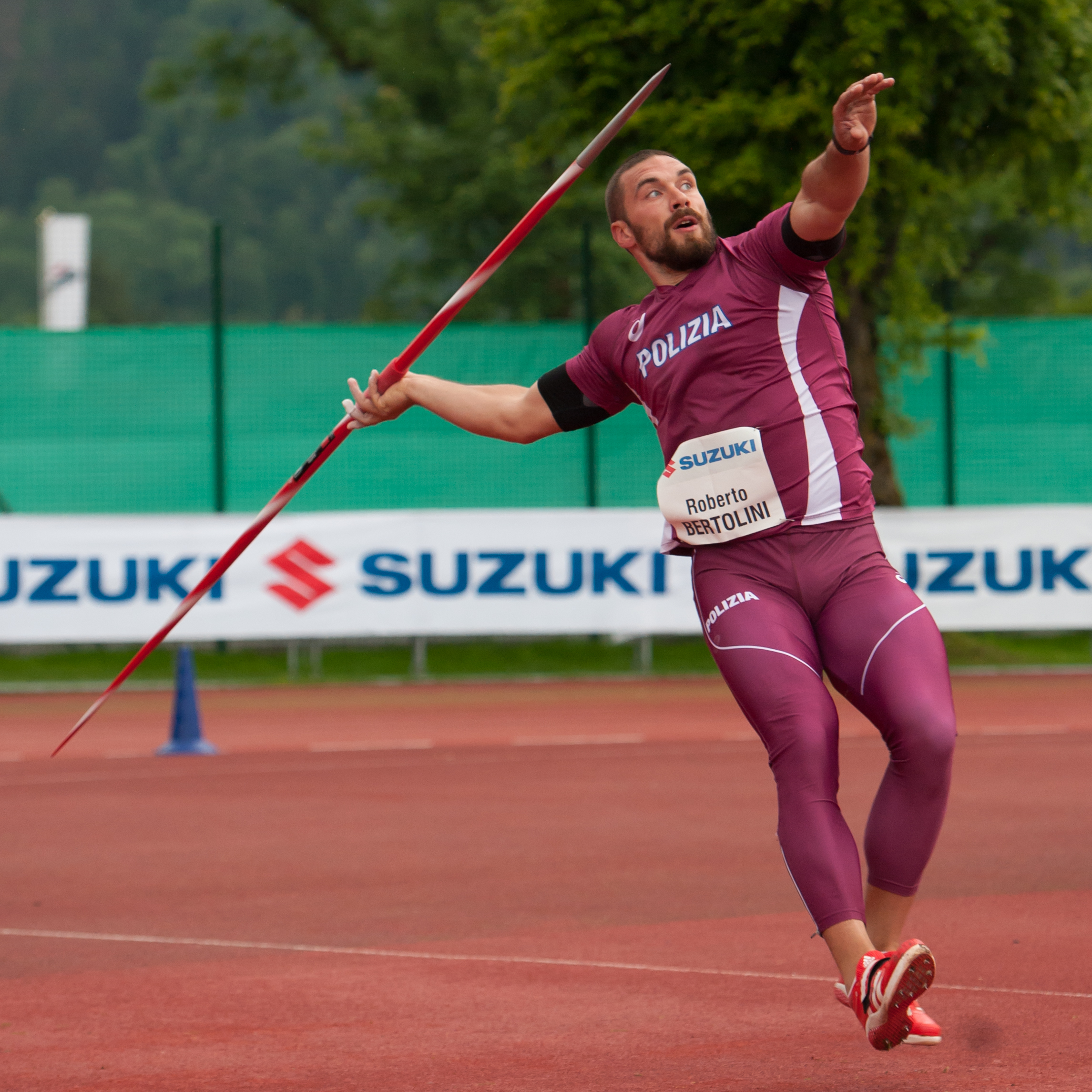 Salzburger Leichtathletik Gala am 27. Mai 2015: Roberto Bertolini